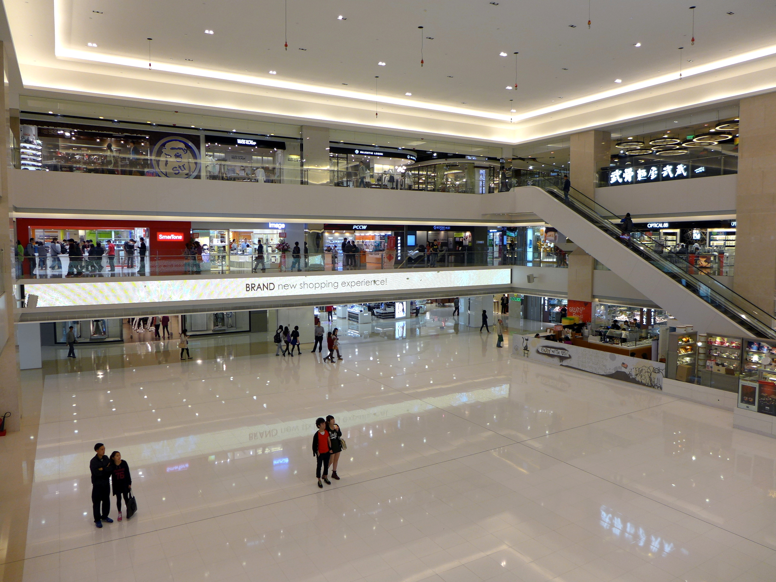 tmtplaza Atrium